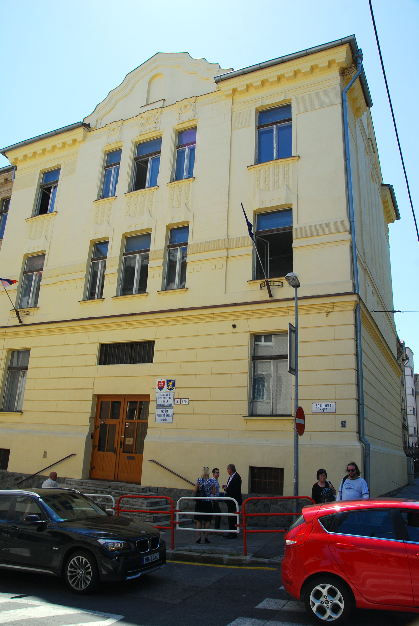 Stredná priemyselná škola elektrotechnická Zochova 9